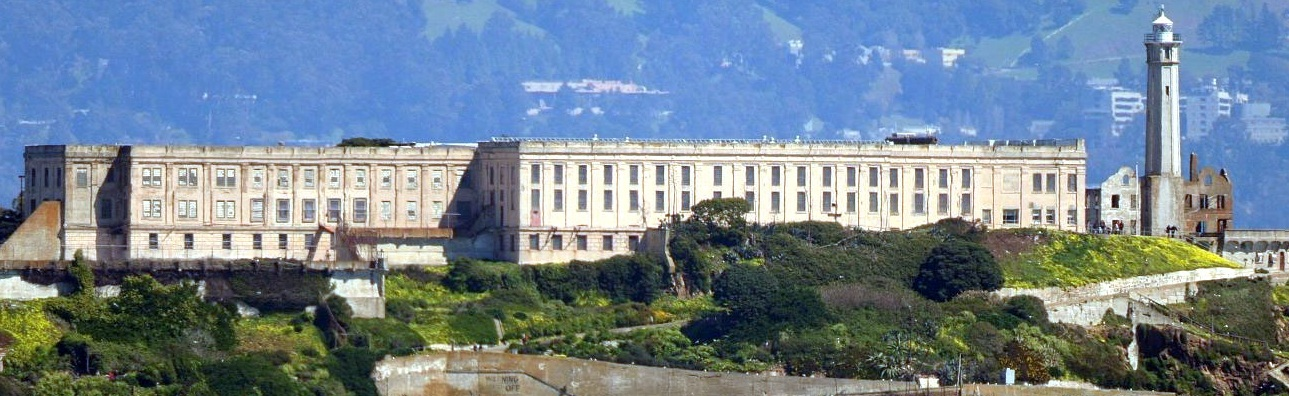 Alcatraz